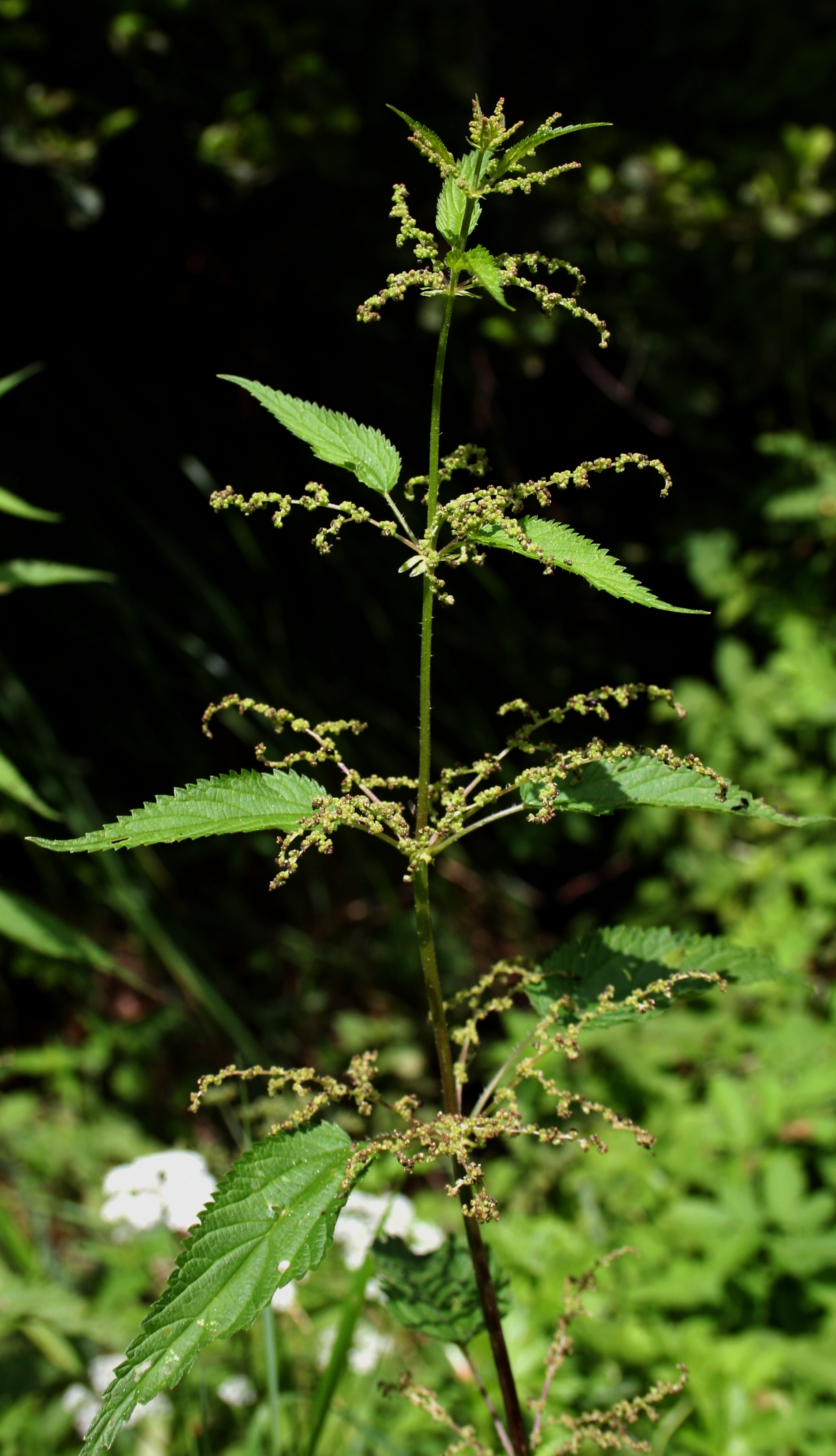 Pokrzywa zwyczajna - pokrój